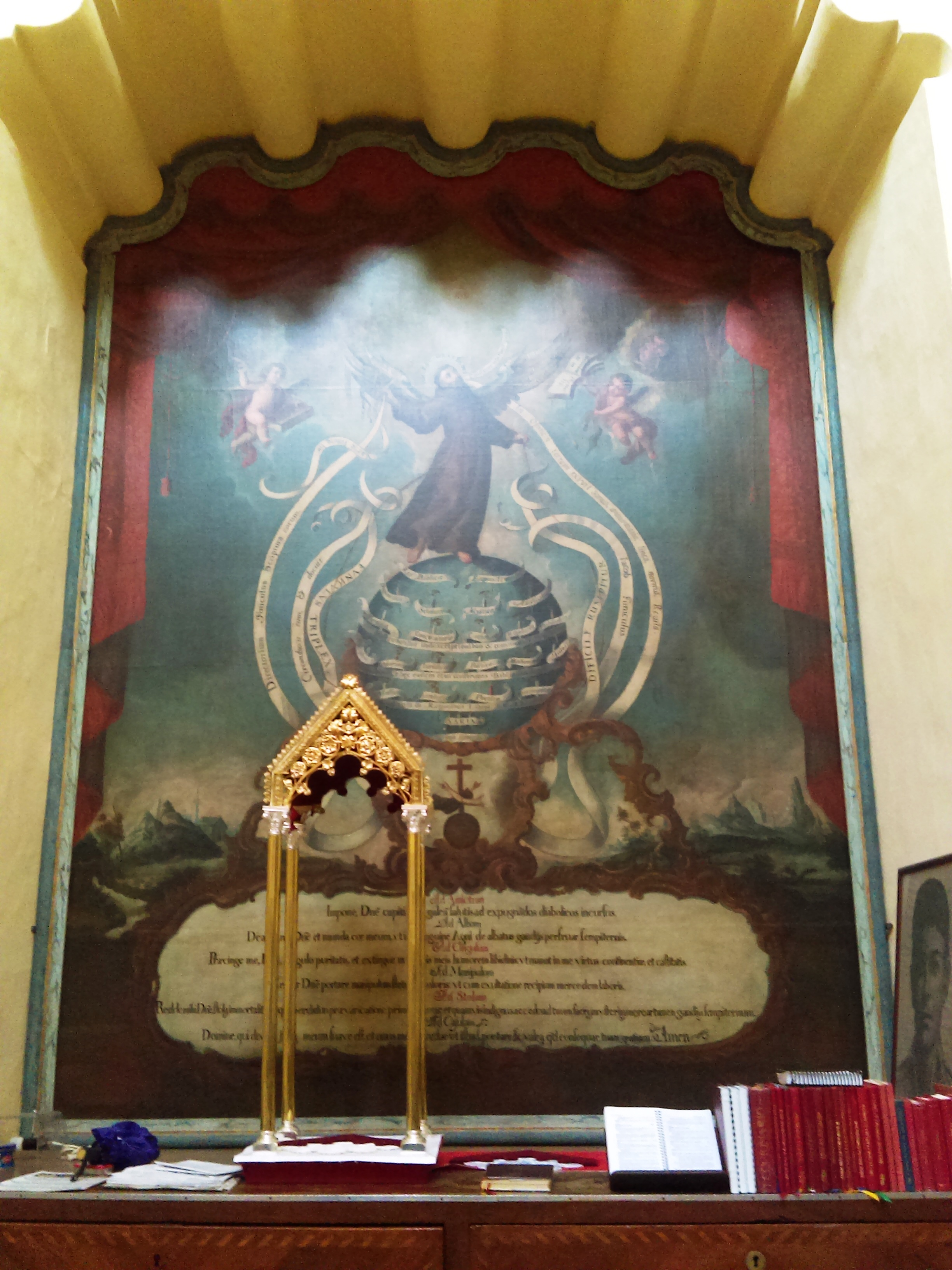 Exconvento de San Francisco en Pachuca, México.